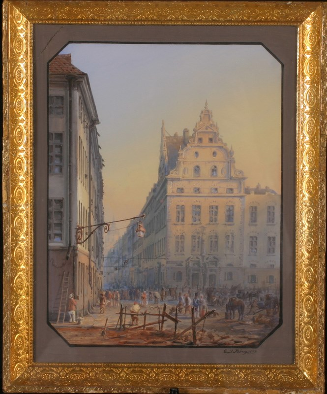 Folkliv vid Munkbrotorget, gouache 1848 av dekorationsmålaren Emil Roberg (1821-1859). Mått: h320 x b260. Utgiven av Stockholms stadsmuseum. Objekt-ID: SSM10552.